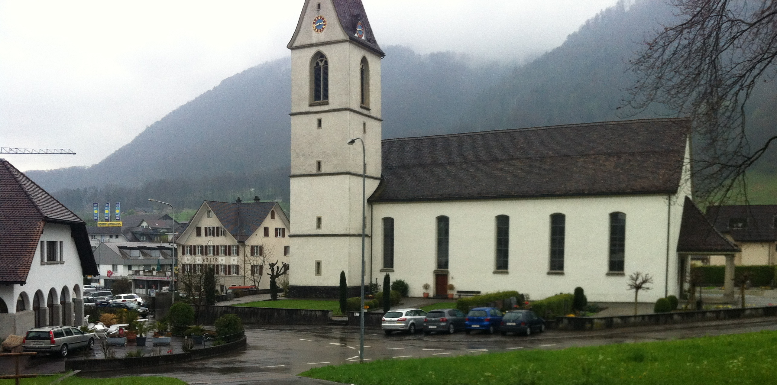 Pfarrkirche St. Konrad und Ulrich, Schübelbach